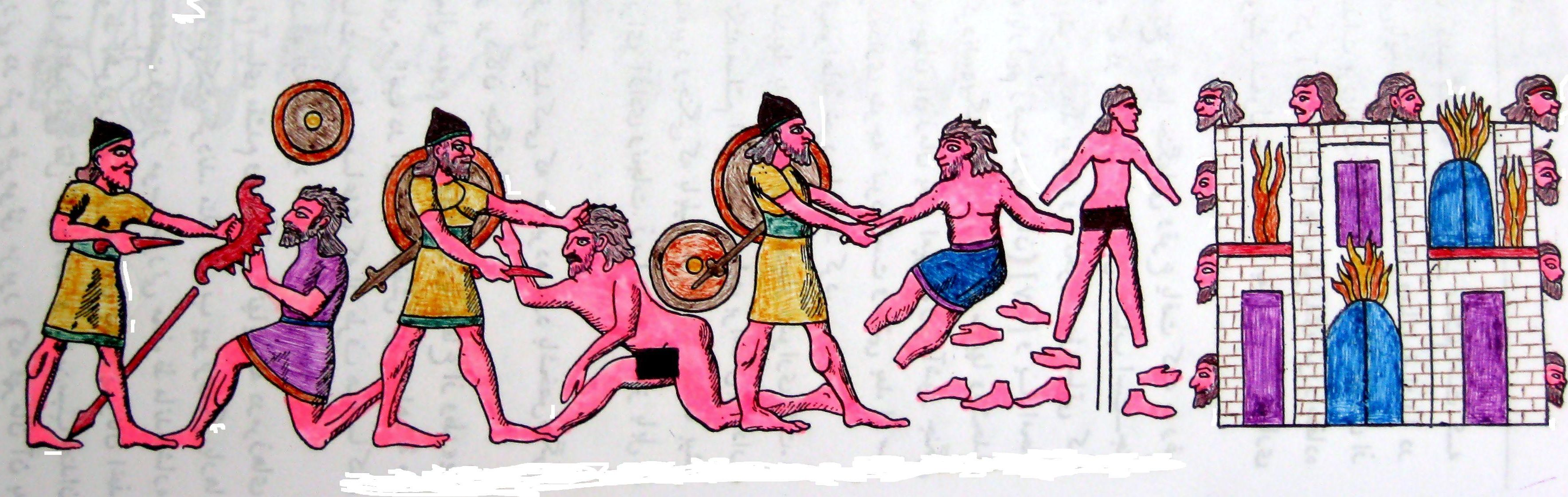 سیاست مغلوبان جنگ آغاز هزاره‌یکم پیش از میلاد، خاک ماد